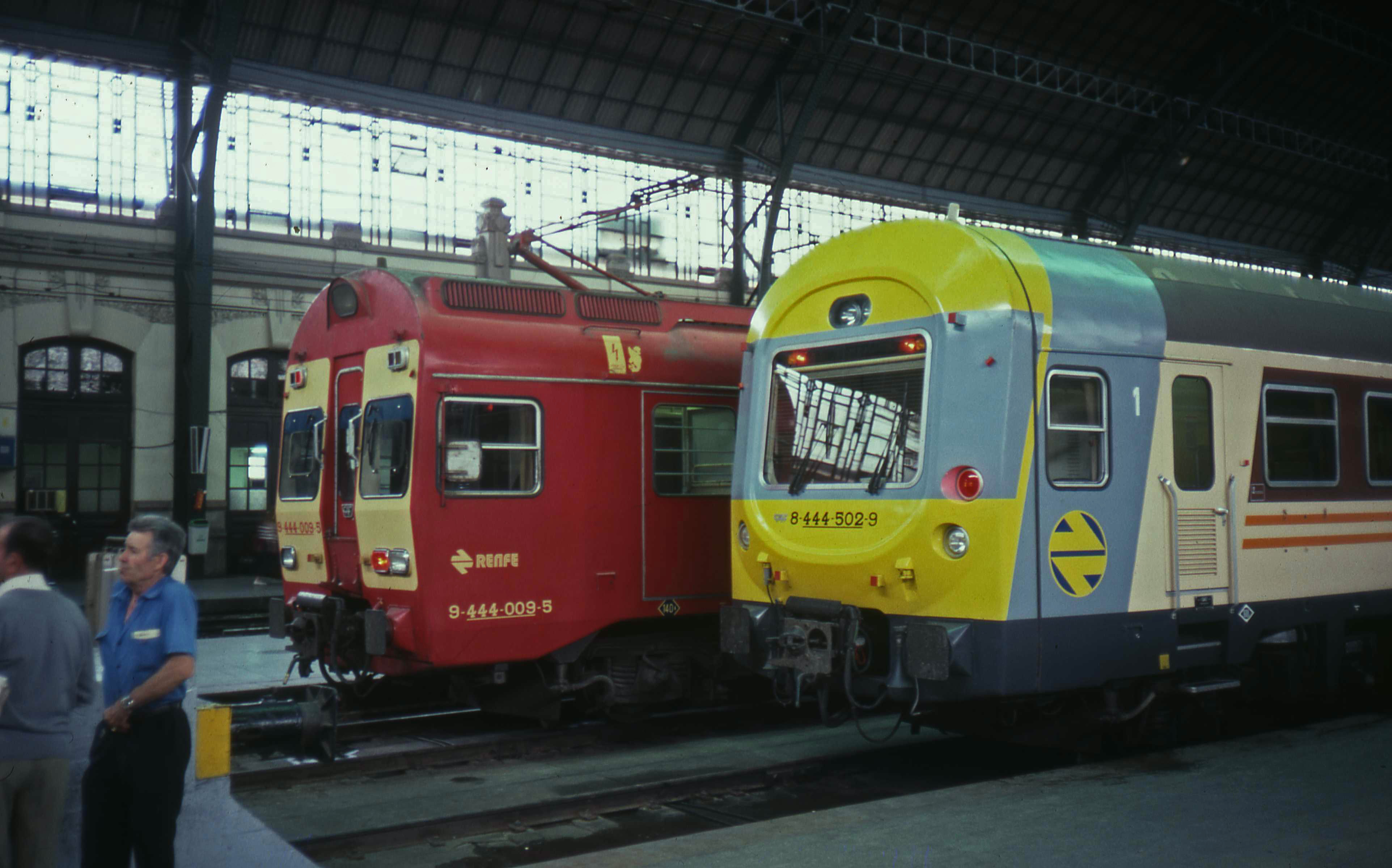 Trens a l'Estació del Nord